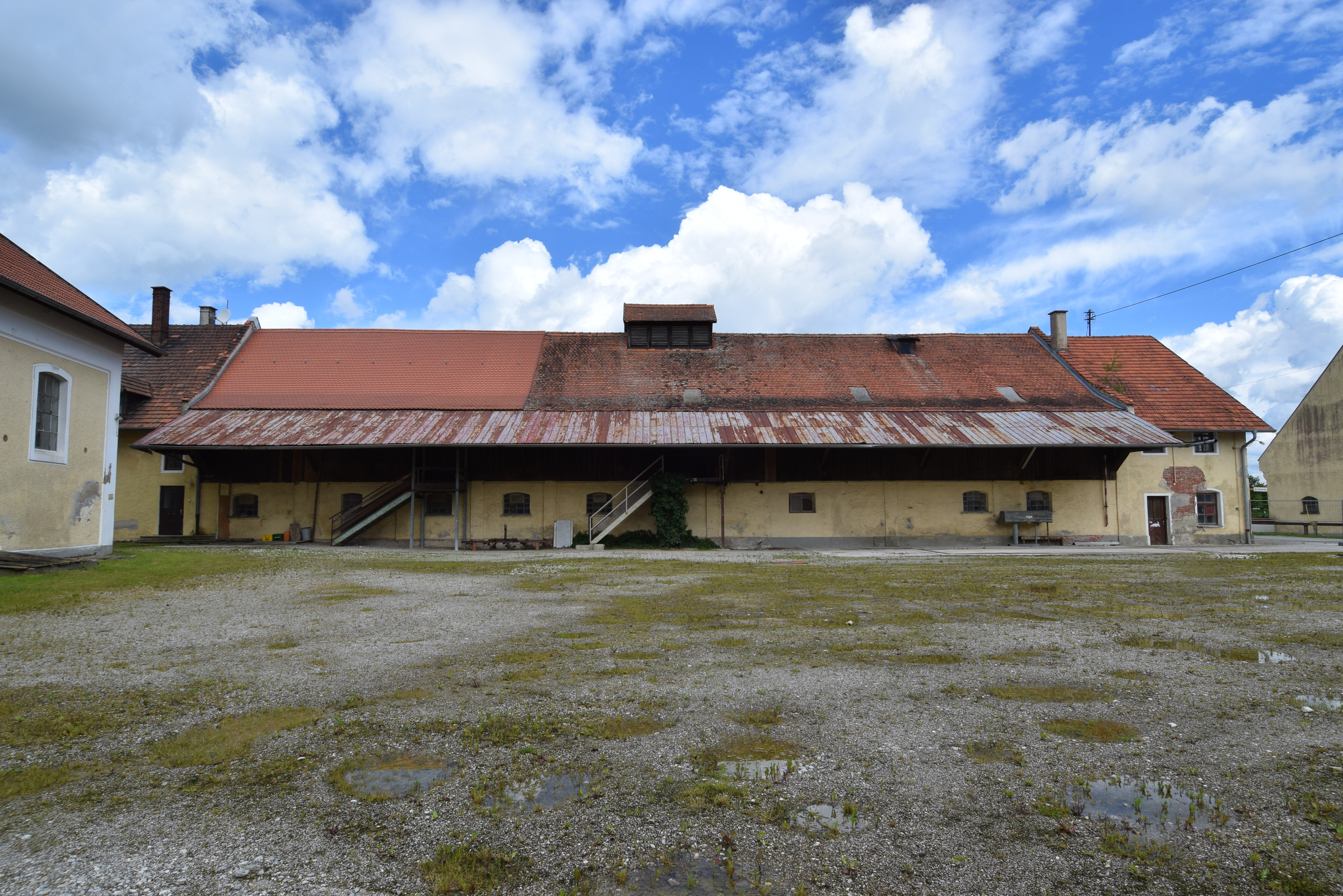 Ehemaliger Ochsenstall im Nordosten des großen Wirtschaftshofes von Gut Freiham